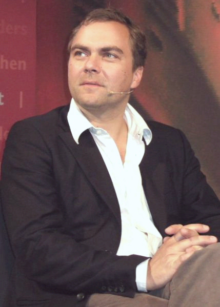 Jakob Arjouni Aufnahme: 6.10.2006 Url: Hans Weingartz